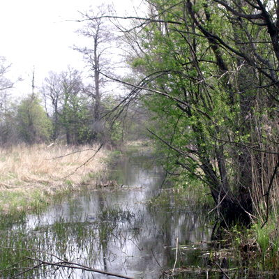 Kanał Zaborowski opodal Zaborowa Leśnego w Kampinosie